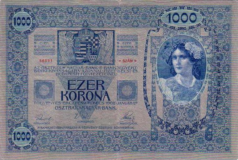 1000 Austro-Hungarian Kronen/Korona (1902), I. AUFLAGE - obverse